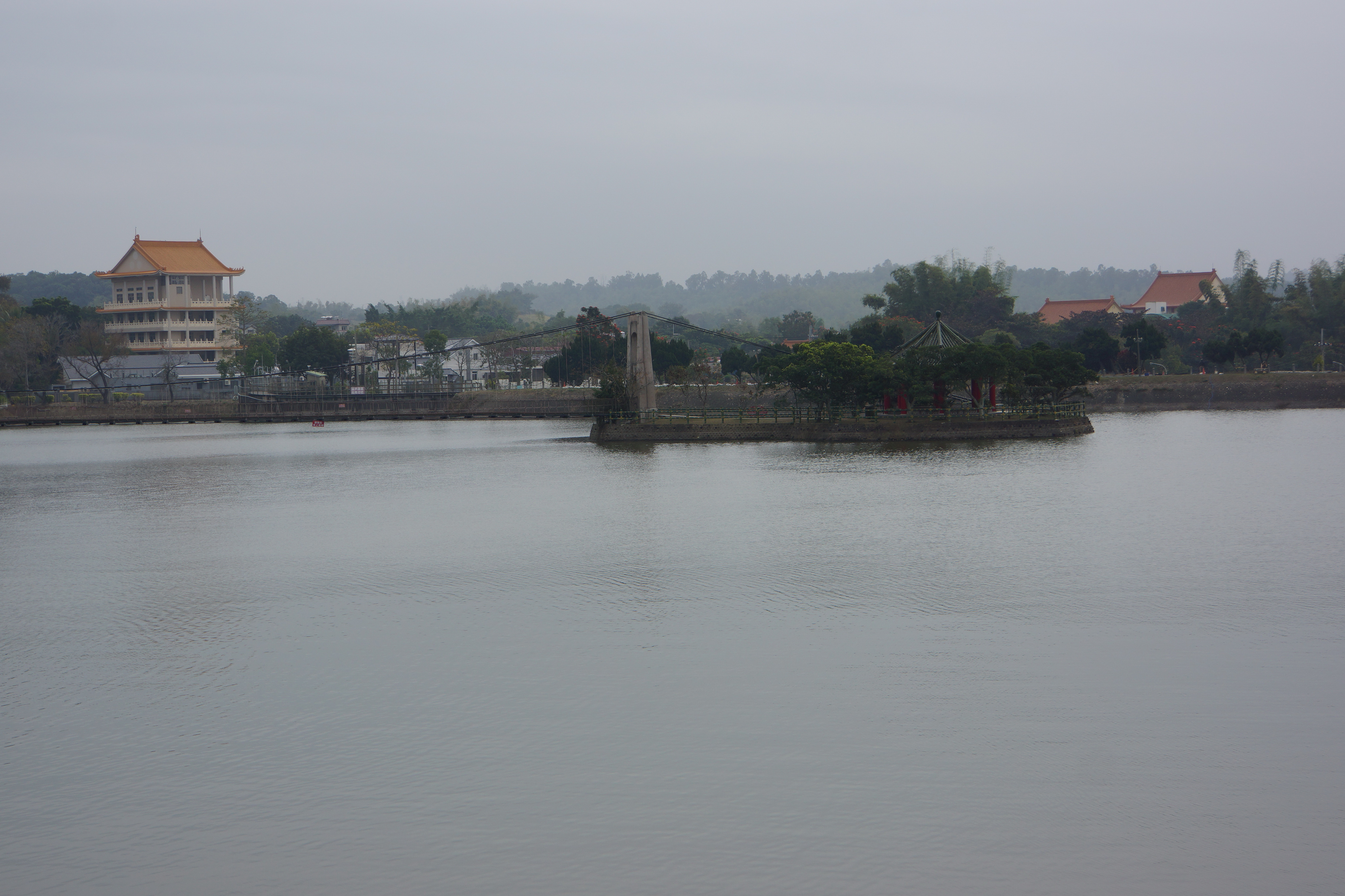 Hutoupi Lake 虎頭埤